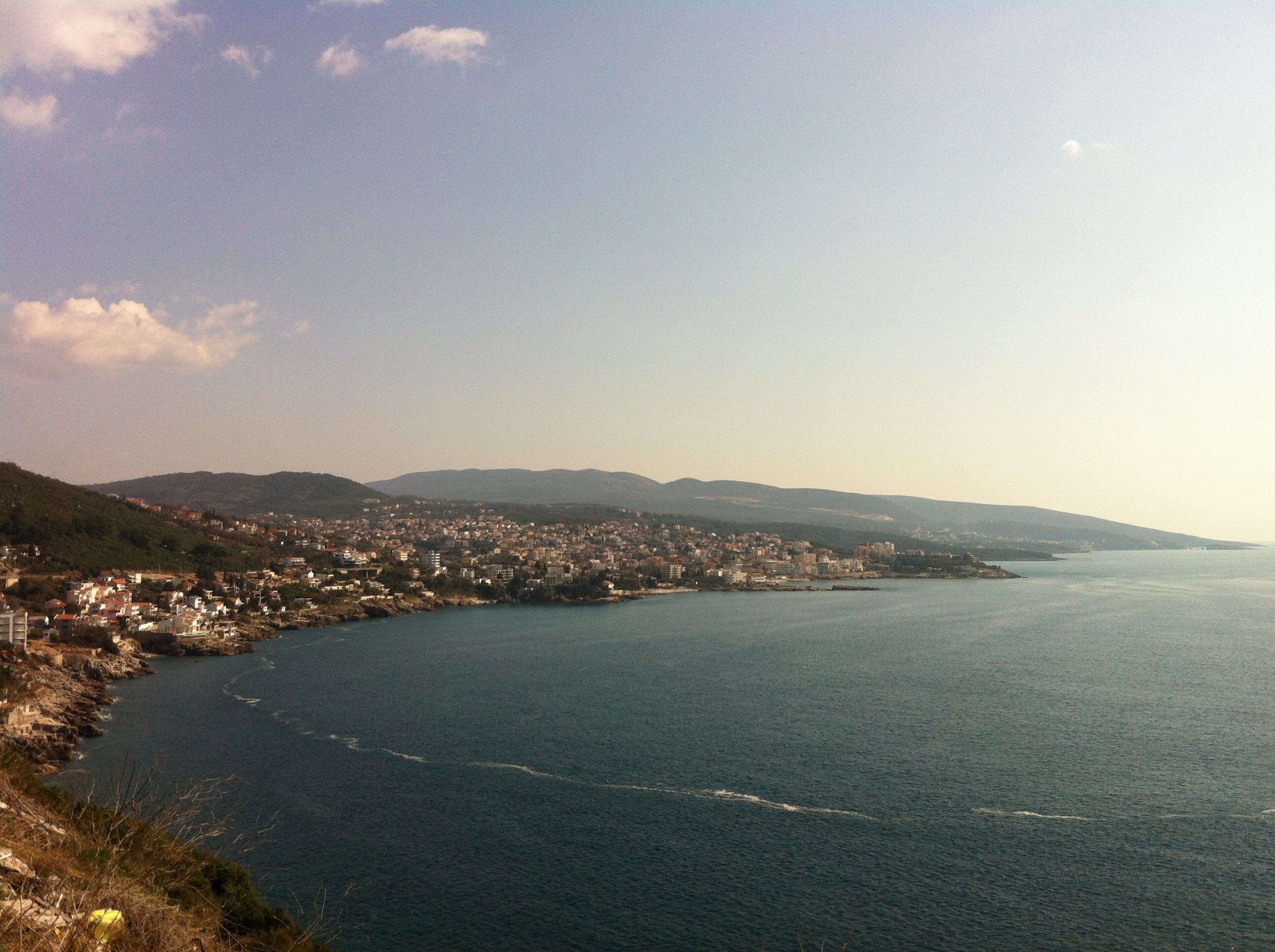 Dobra Voda, Montenegro